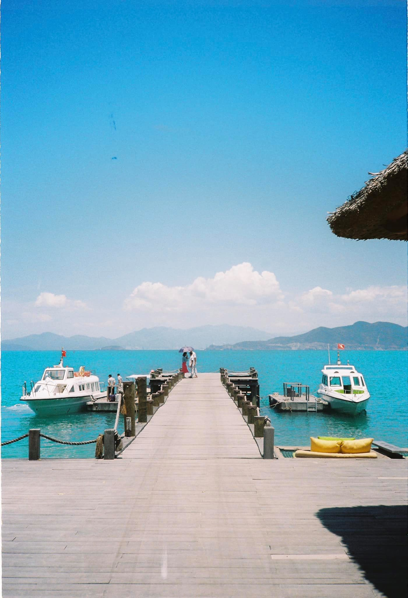 cảng vào khu resort